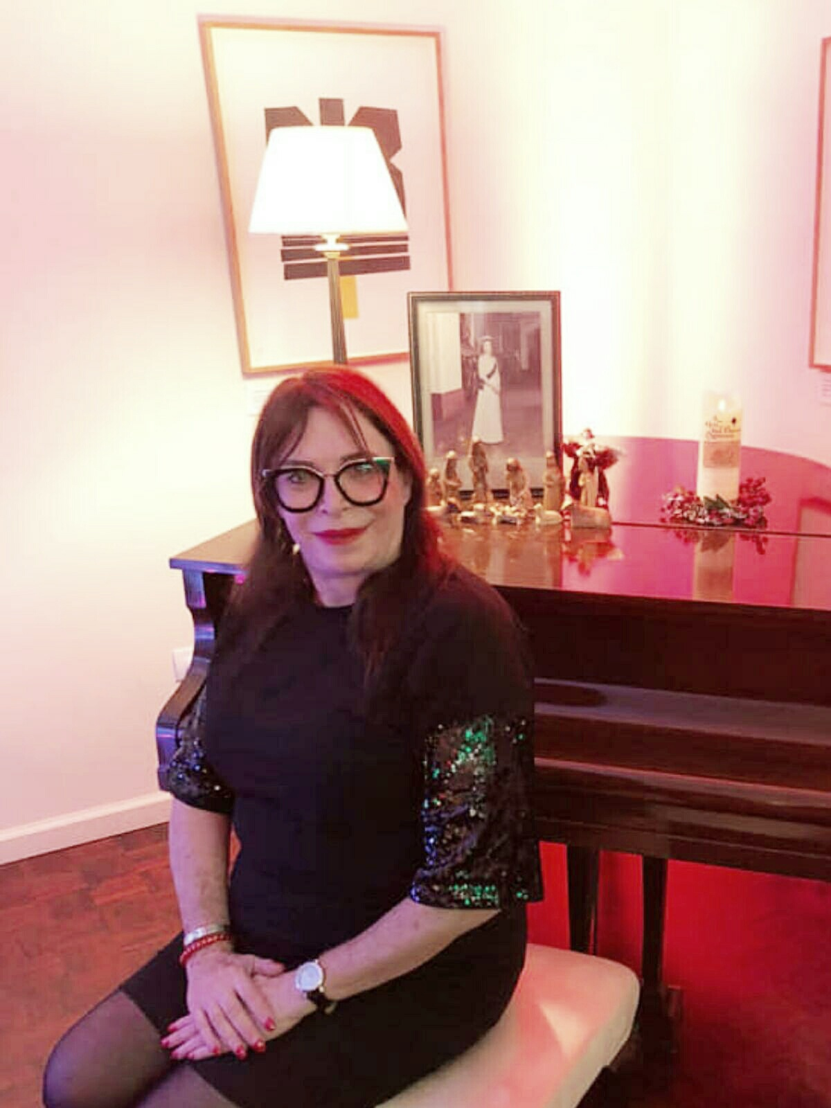 אפרת טילמה בבית השגריר הבריטי